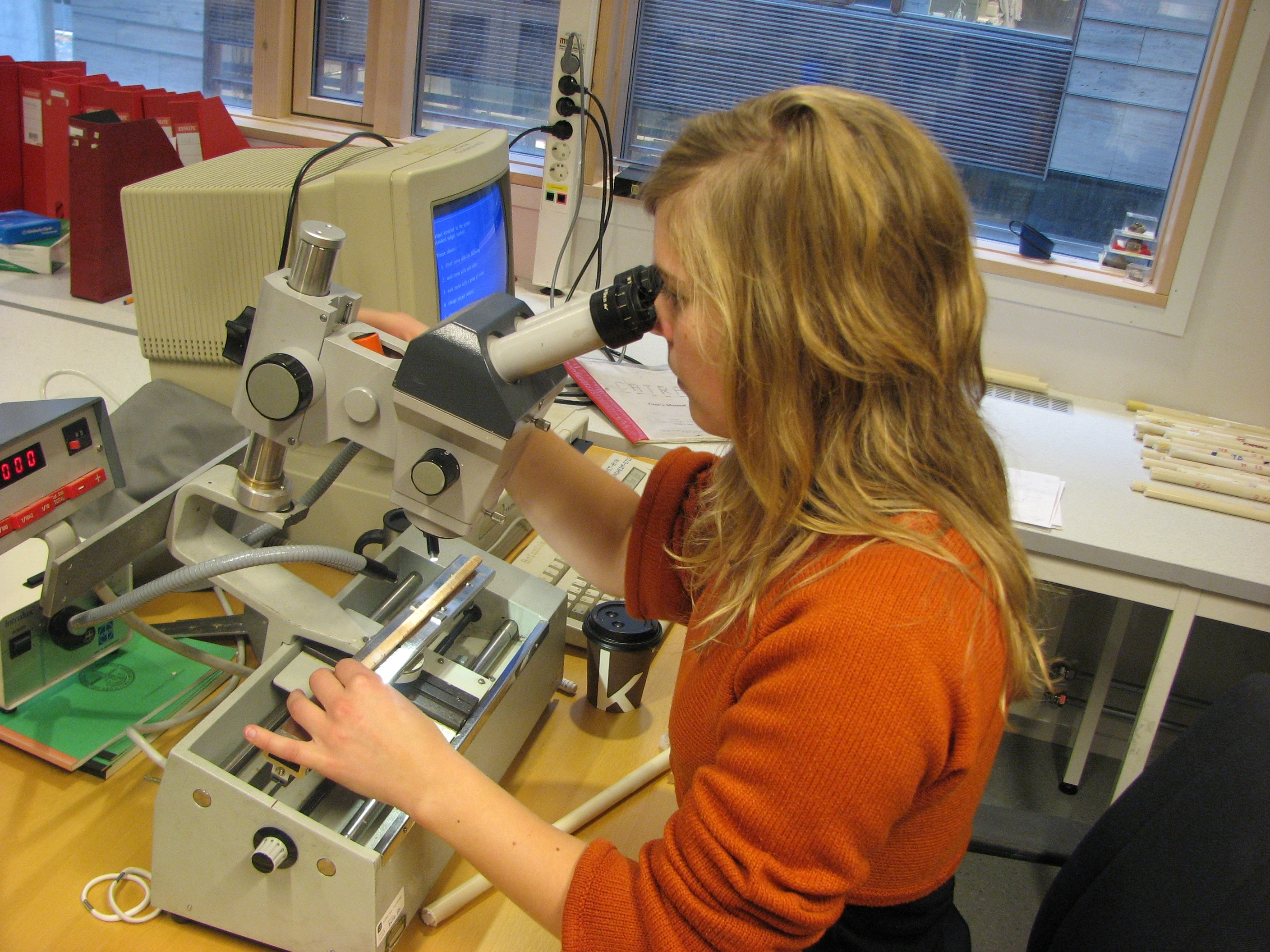 Dendrokronologisk undersøking i lab på NTNU Ved bruk. vennligst kreditér: Foto: Terje Thun, NTNU Vitenskapsmuseet If used, please credit: Photo: Terje Thun, NTNU Museum of Natural history and Archaology